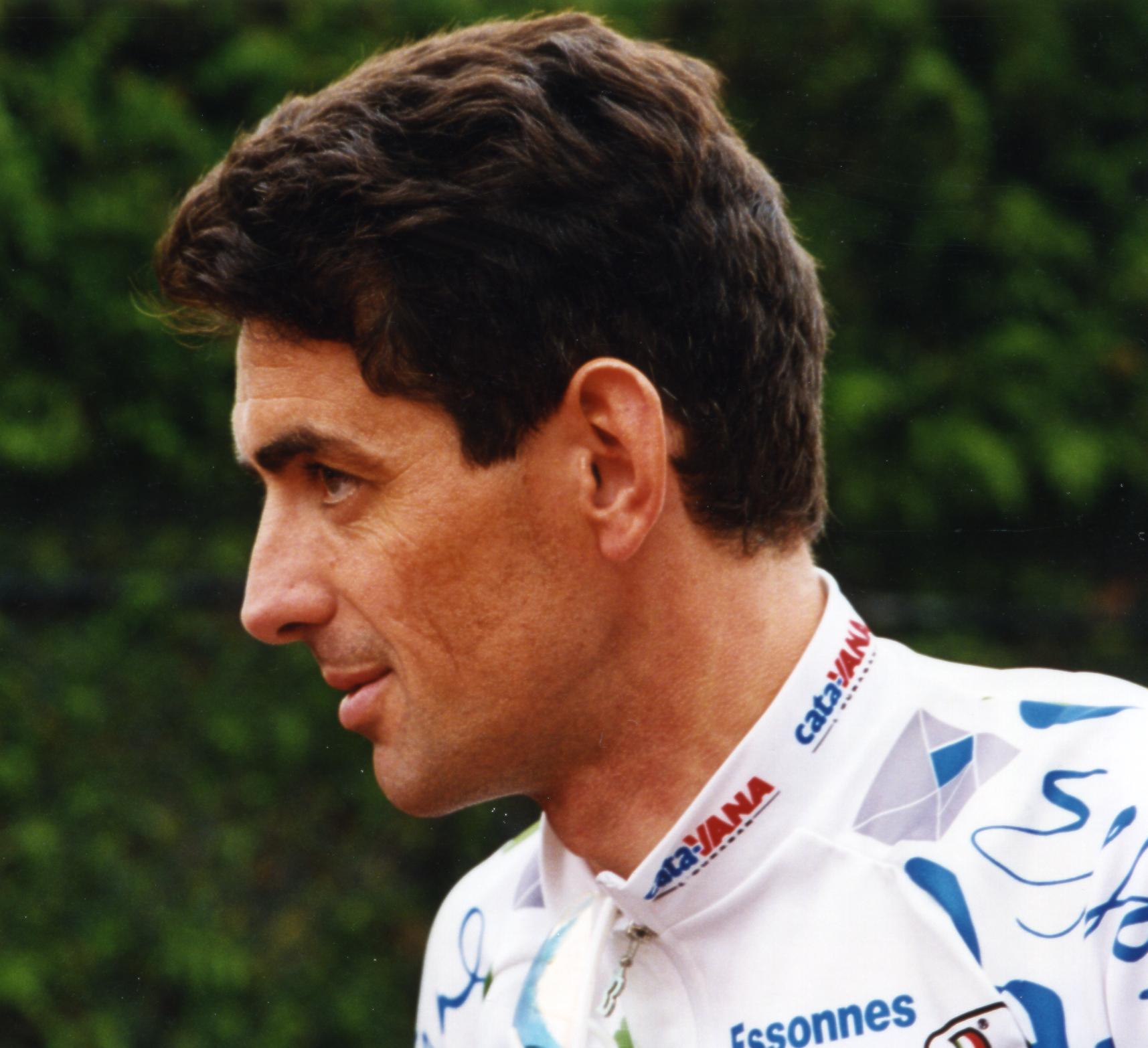 AU JUBILE PATRICE ESNAULT